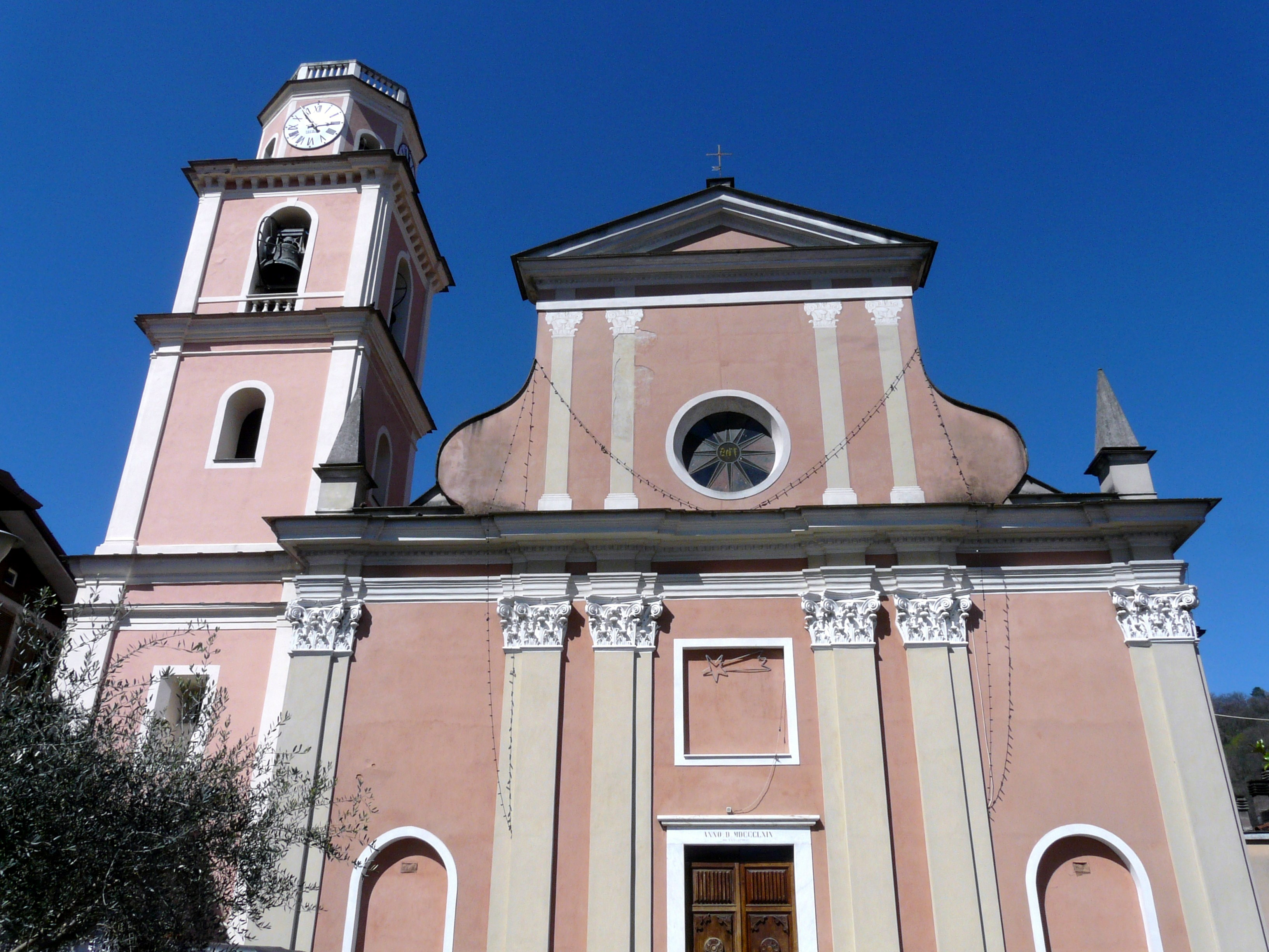 La chiesa di Santa Maria Ausiliatrice di Piana Battolla, Follo, Liguria, Italia